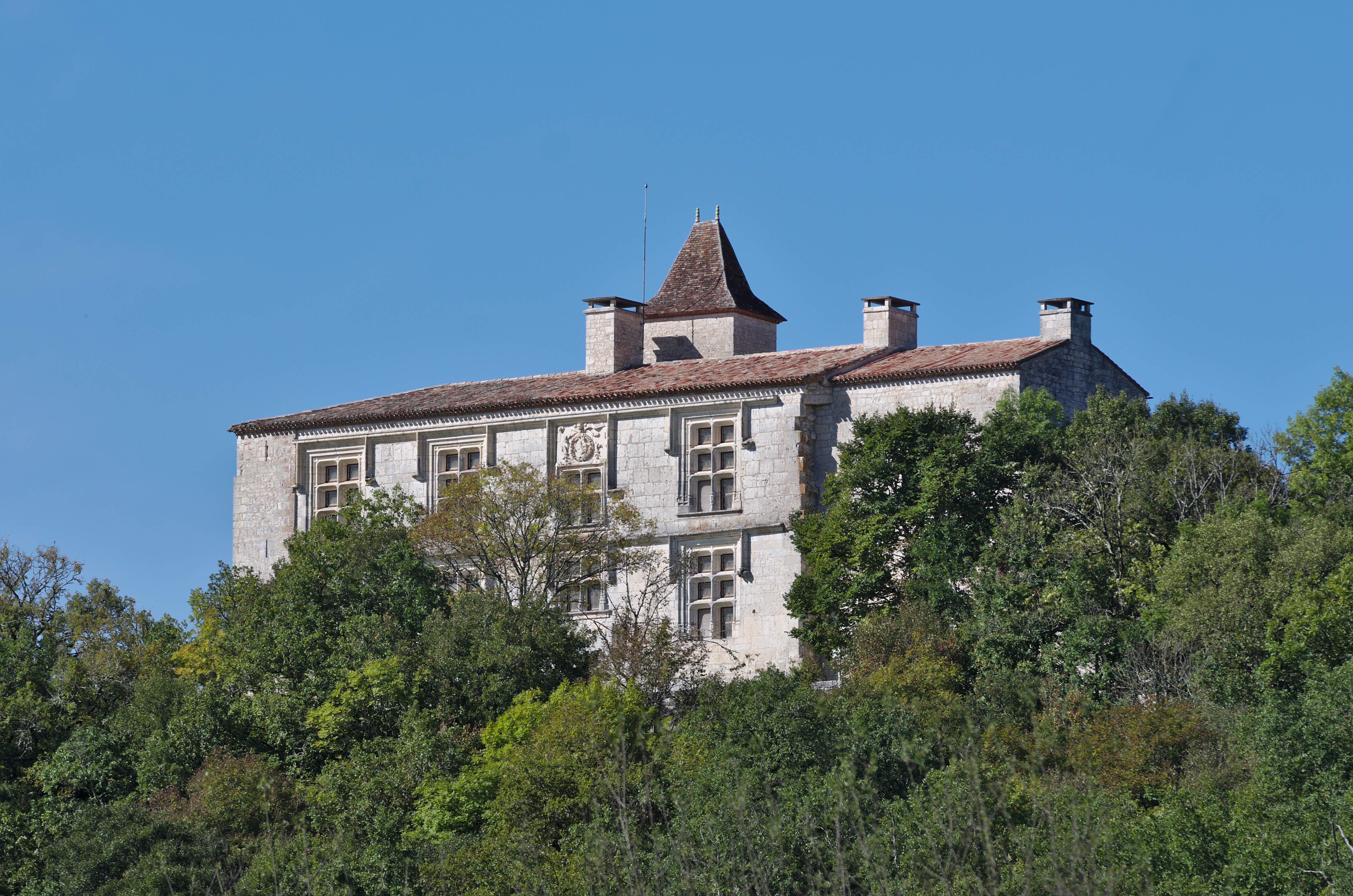 Chateau de Cieurac - 20140922